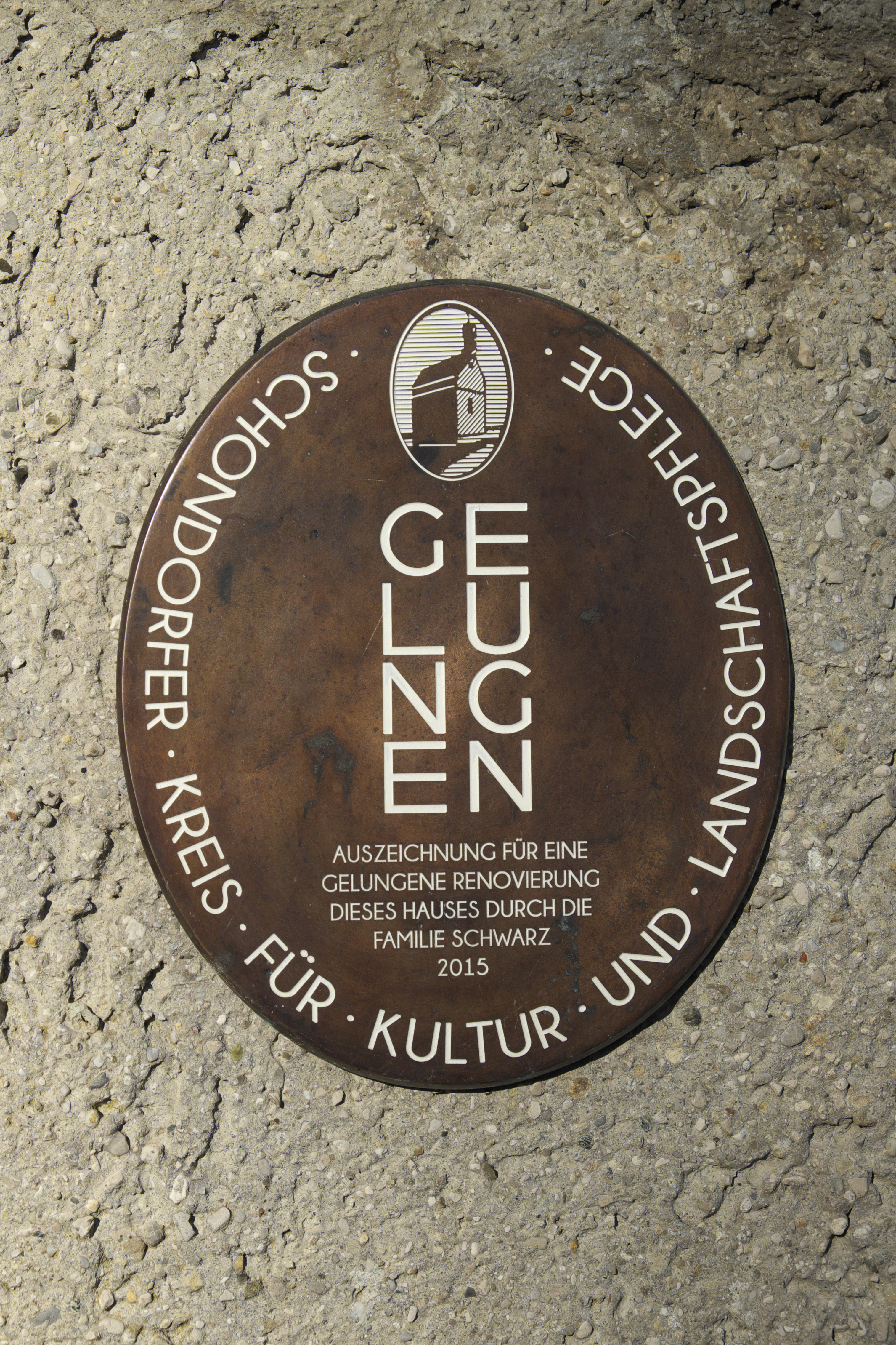 Villa in der Seestraße 16 in Unterschondorf (Schondorf am Ammersee) im Landkreis Landsberg am Lech (Bayern/Deutschland), Plakette Gelungen